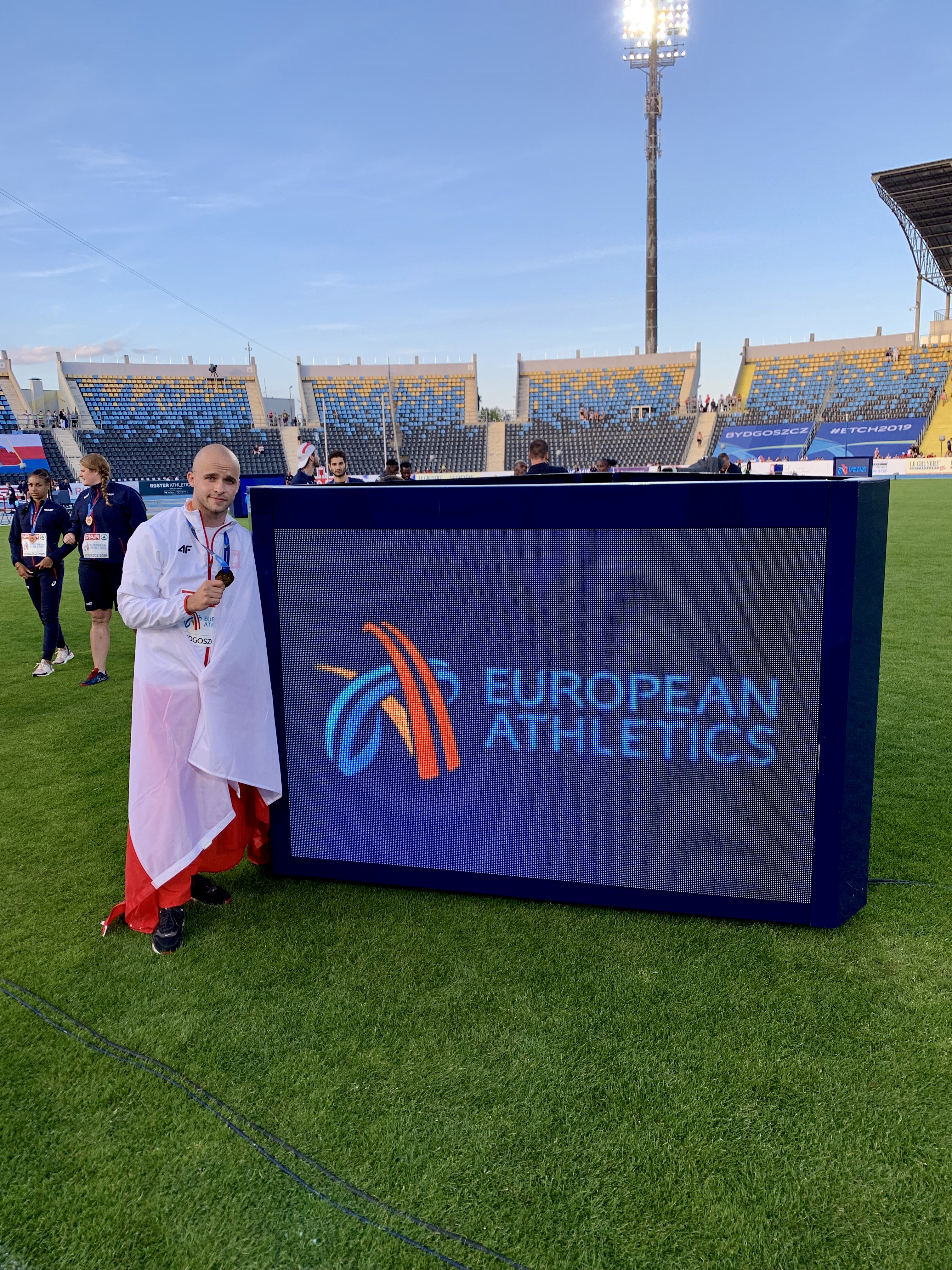 Eryk z złotem Drużynowych Mistrzostw Europy